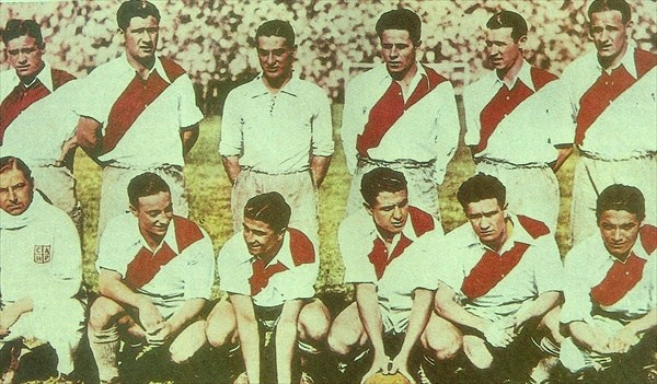 poster. Arriba: Malazzo, Dañil, Sirni, Bernabé Ferreyra, Basílica y Santamaría. Abajo: Zatelli, Lago, Cuello, Peucelle y Luna.